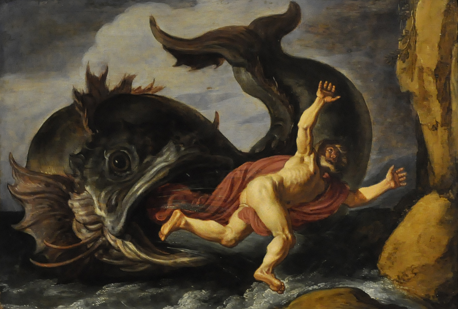 Pieter Lastman (1583-1633) - Jonas en de walvis (1621) - Museum Kunstpalast Düsseldorf